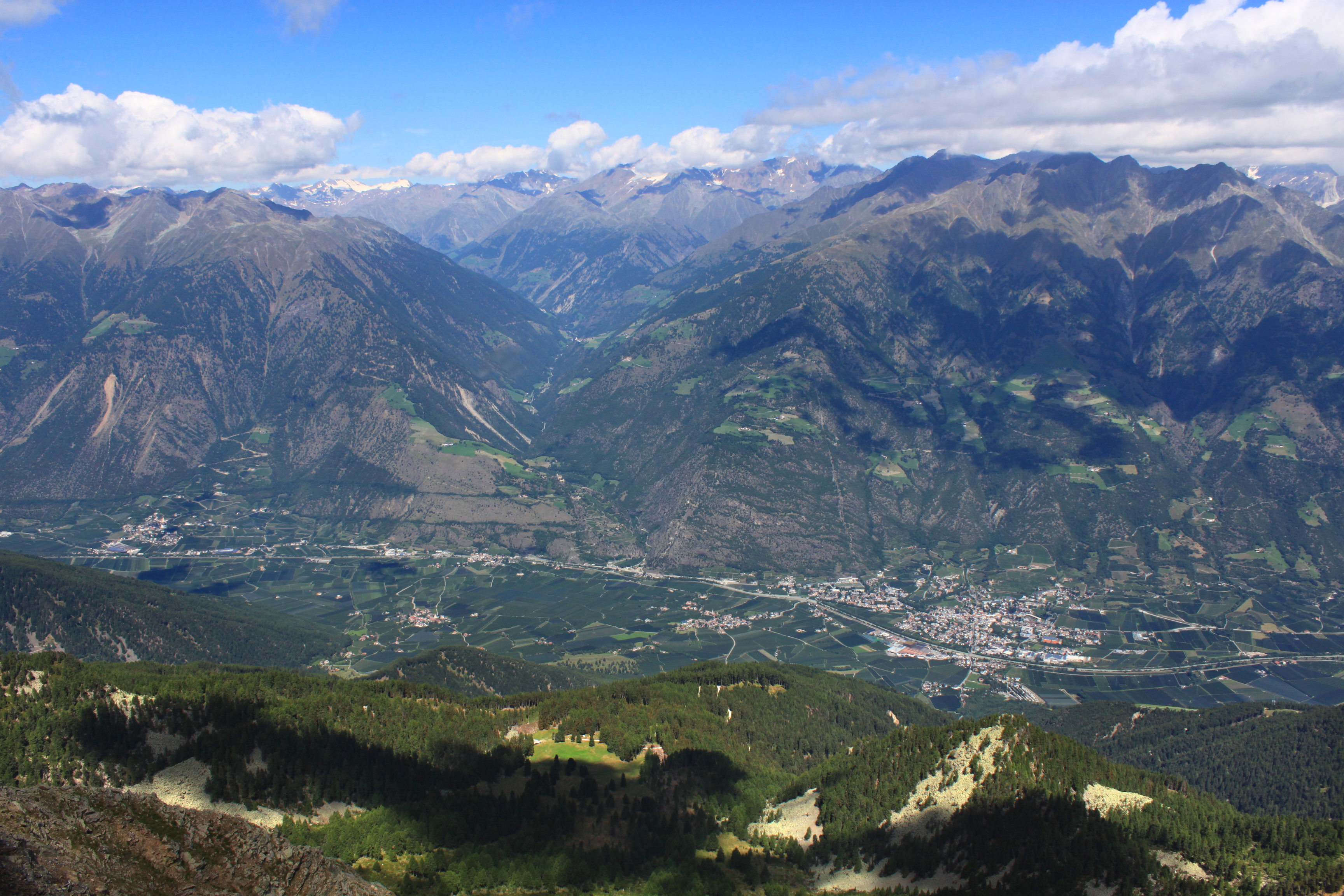 Blick nach Tschars und Naturns vom Gipfel der Naturnser Hochwart (2608 m.ü.M.). In der Mitte liegt der Zugang zum schönen Schnalstal mit dem Similaunmassiv. Die Naturnser Hochwart (italienisch Guardia Alta) ist ein 2608 Meter hoher Berg im Zufrittkamm der Ortler-Alpen. Die Hochwart befindet sich im italienischen Südtirol und trennt die Vinschger Gemeinde Naturns von der Ultner St. Pankraz.